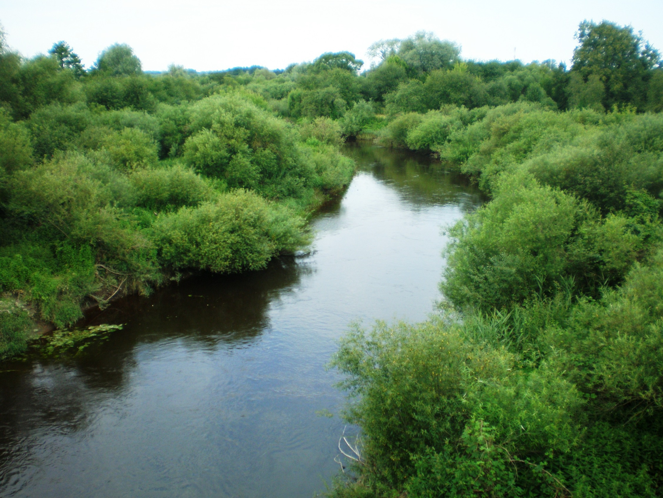 Šešupė ties Pilviškiais, Vilkaviškio raj.